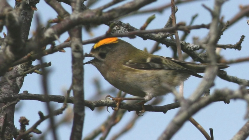 Goldcrest (Regulus regulus)